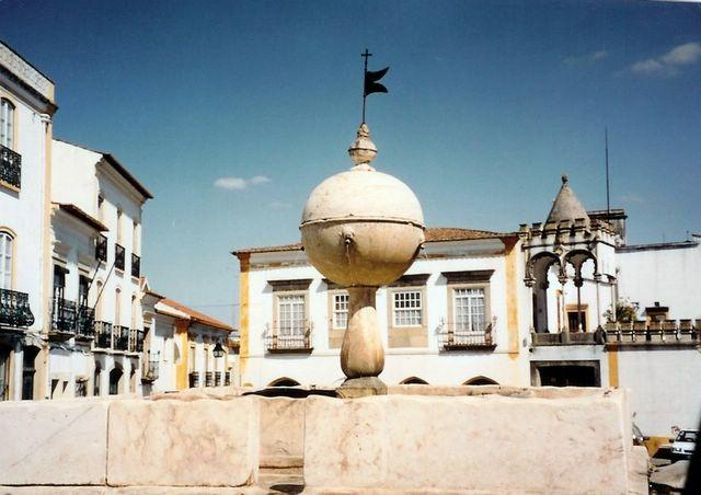 Antiga fonte no centro de Évora, Portugal